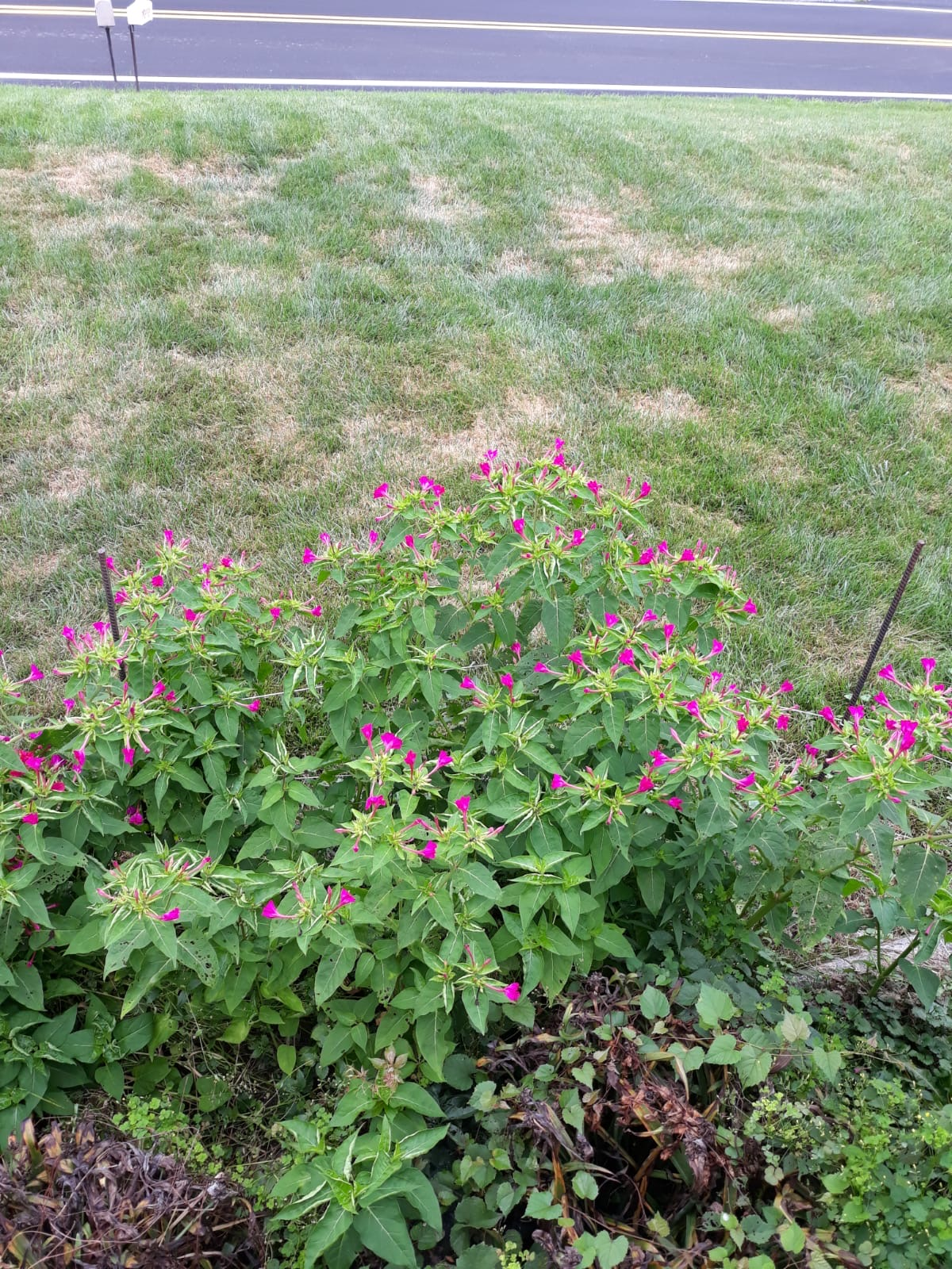 Akşamsefası Bitkisi